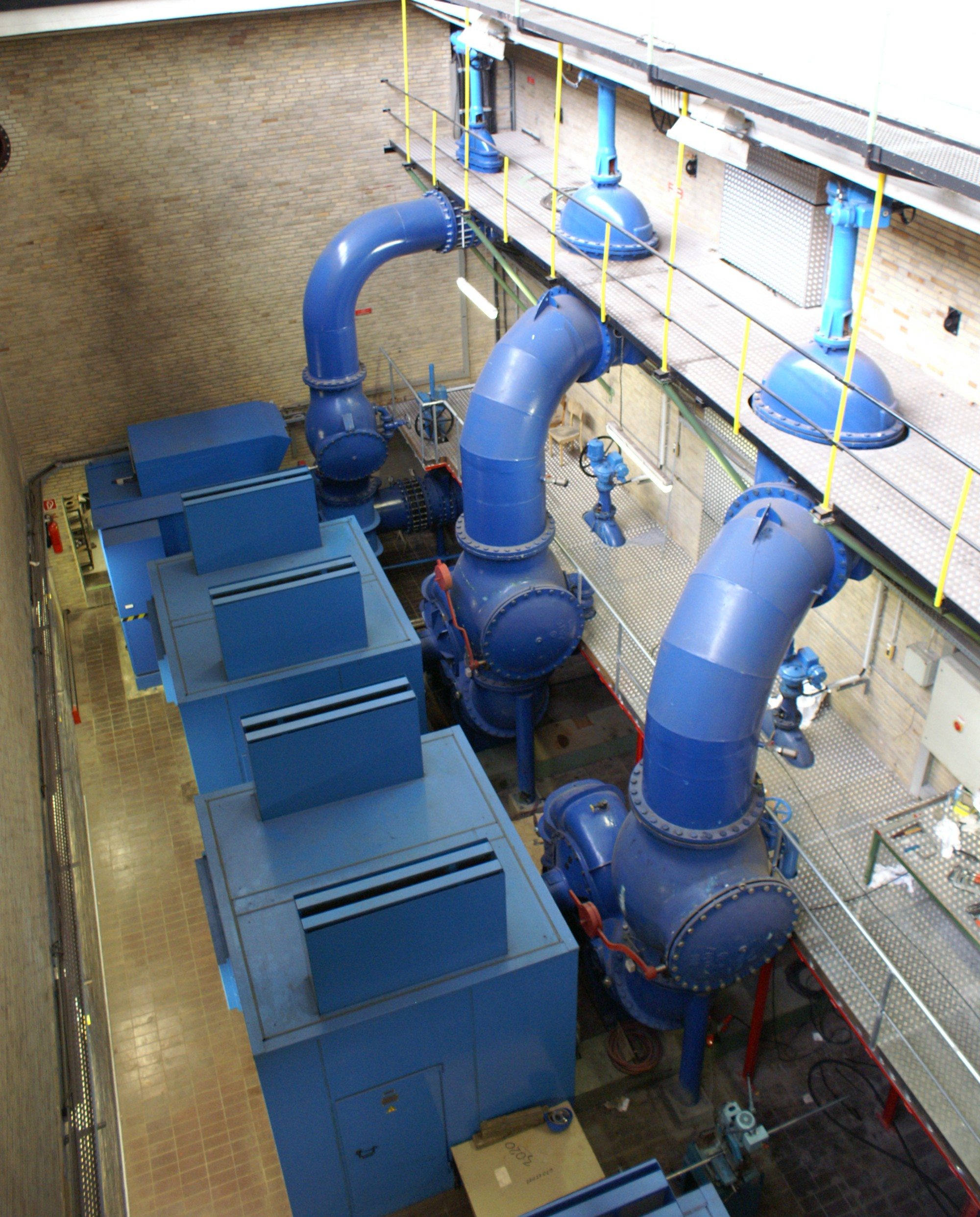 Hamburger Stadtentwässerung Pumpwerk an den Hamburger Landungsbrücken, für den Transport der Abwässer über die Elbe zum Klärwerk